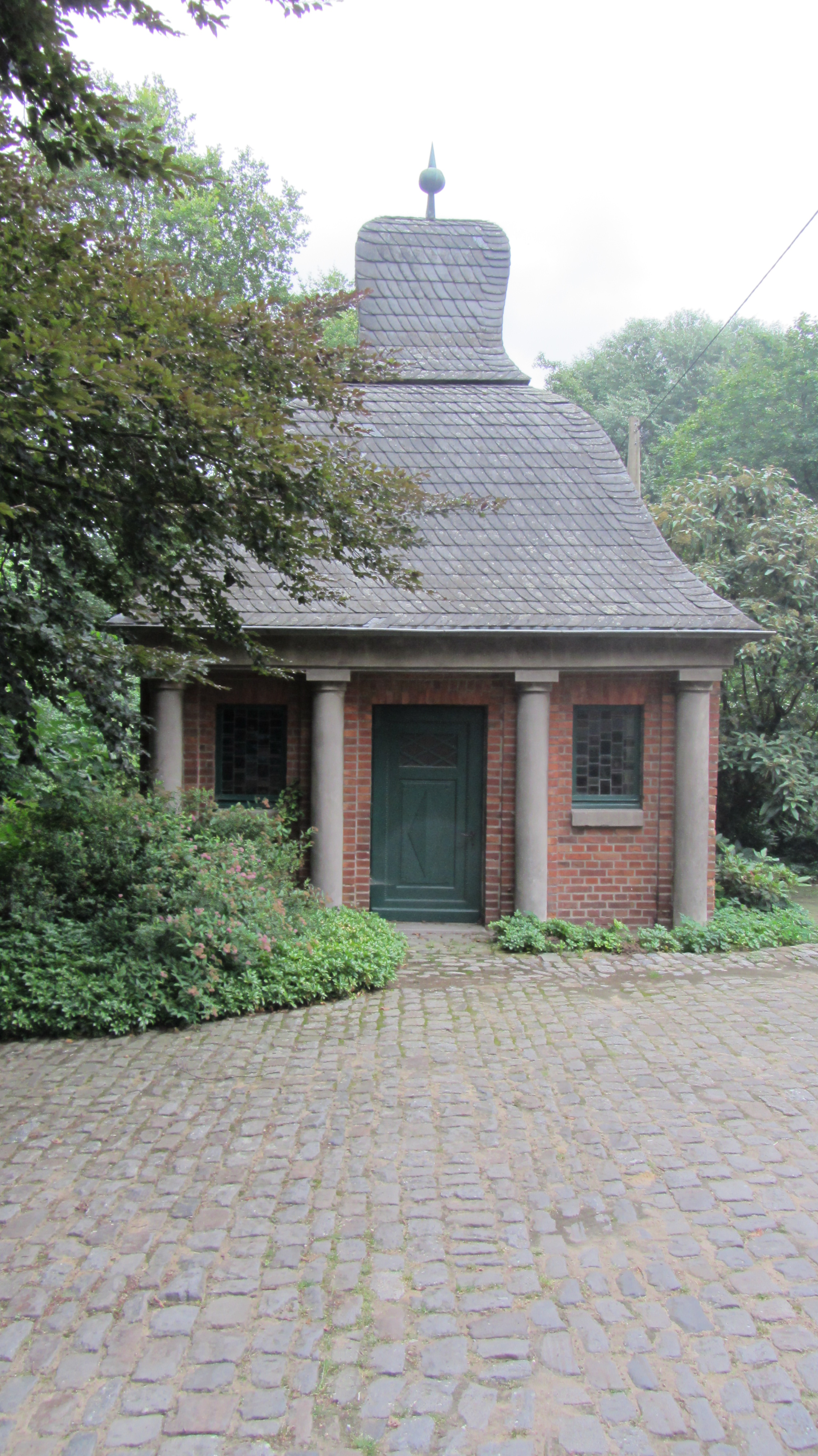 Die Hofkapelle Schulze Althof mit der Reliquie des Hl Gereon von Regnering